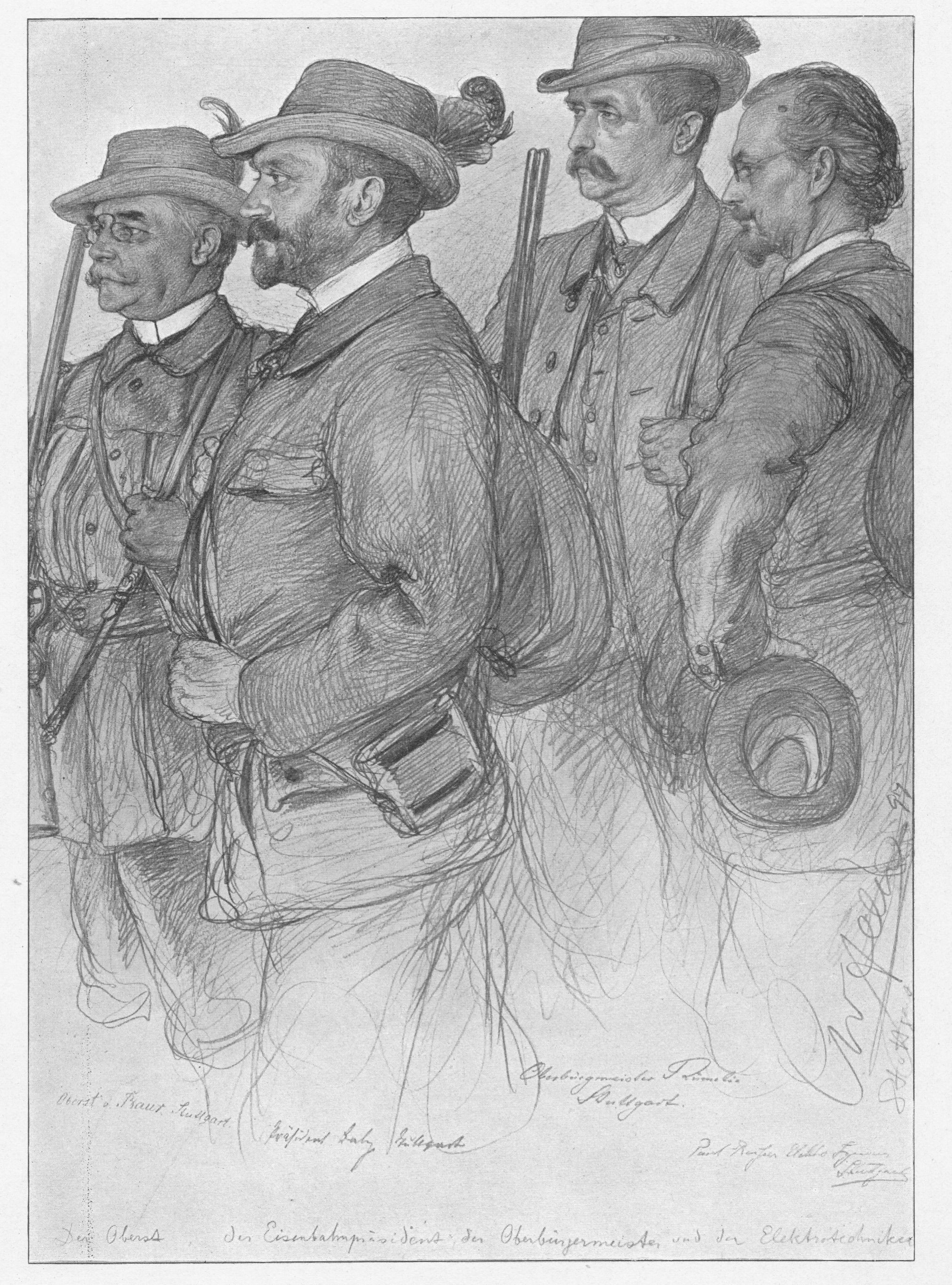 Stuttgarter bei der Jagd, gezeichnet von C.W. Allers: Oberst Hugo von Baur, Eisenbahnpräsident Baby, Oberbürgermeister Emil von Rümelin, Paul Reißer Elektrotechniker.